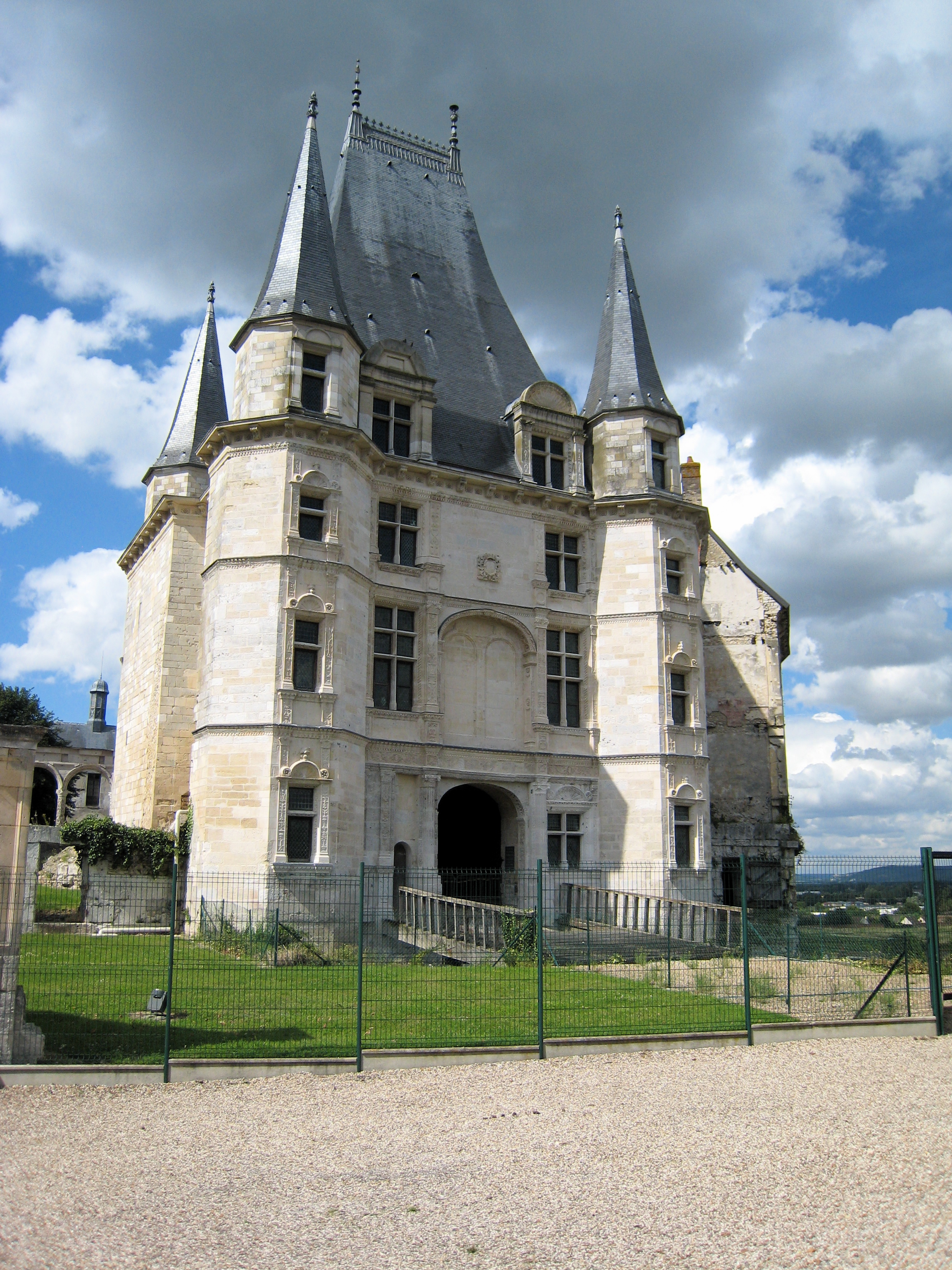 Chateau de Gaillon, Eure, France